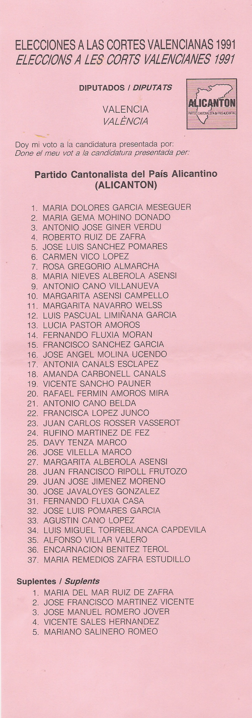 Papeleta electoral del Alicantón (Partido Cantonalista del País Alicantino) por la provincia de Valencia para las Cortes Valencianas, en 1991.